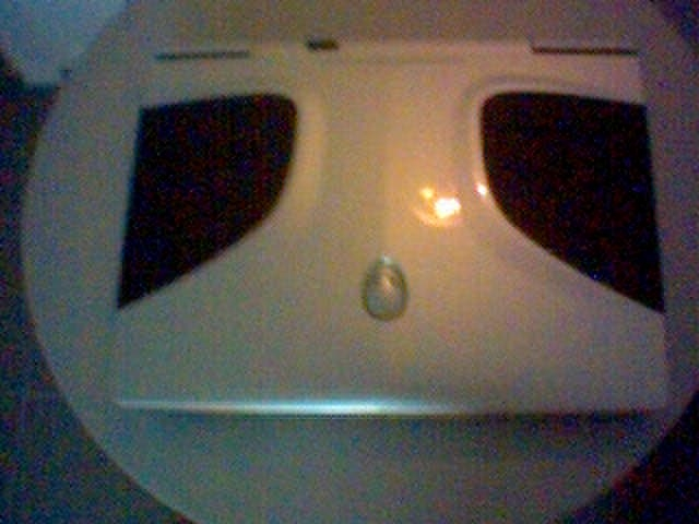 Aurora m9700 silver